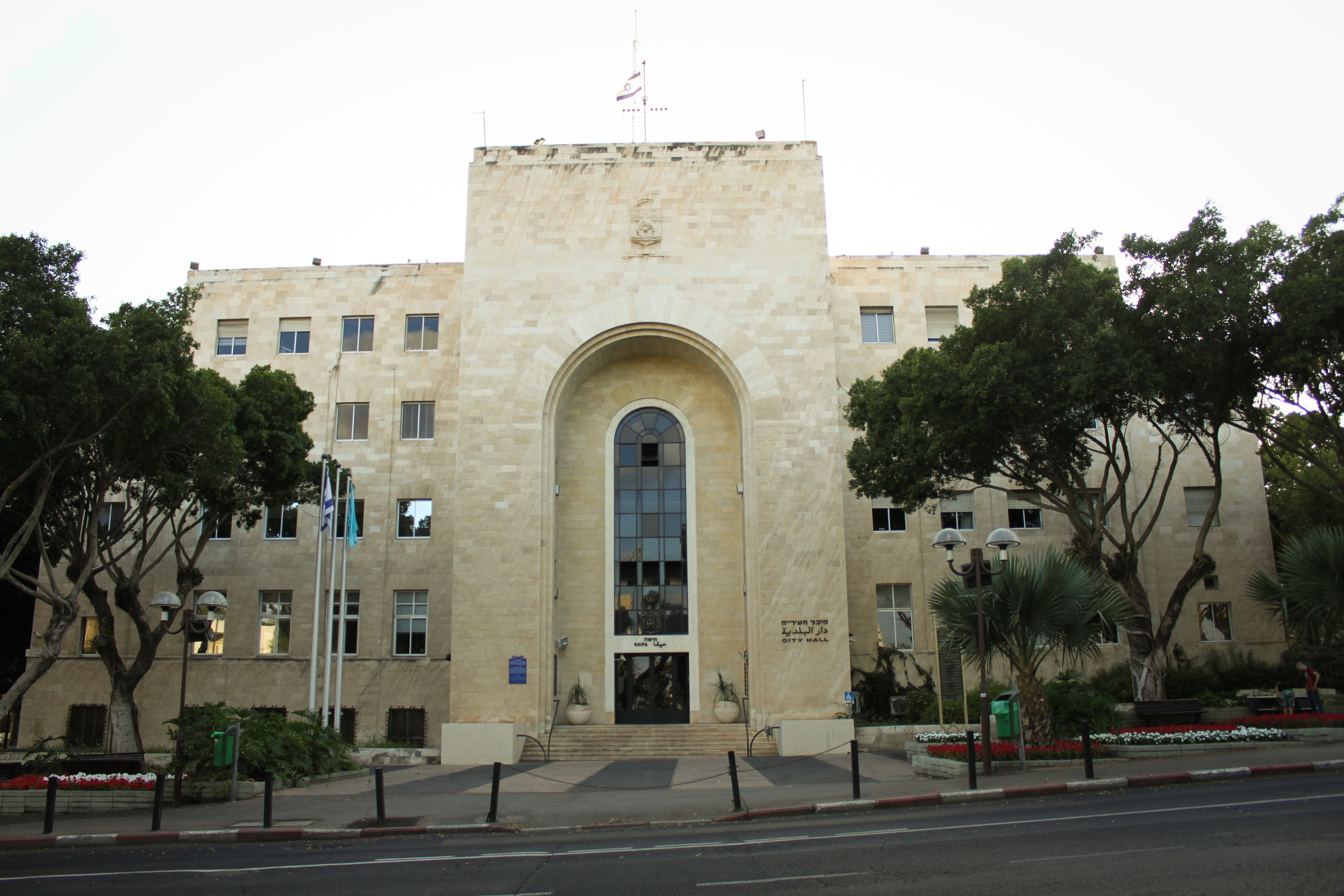 Haifa, Israel